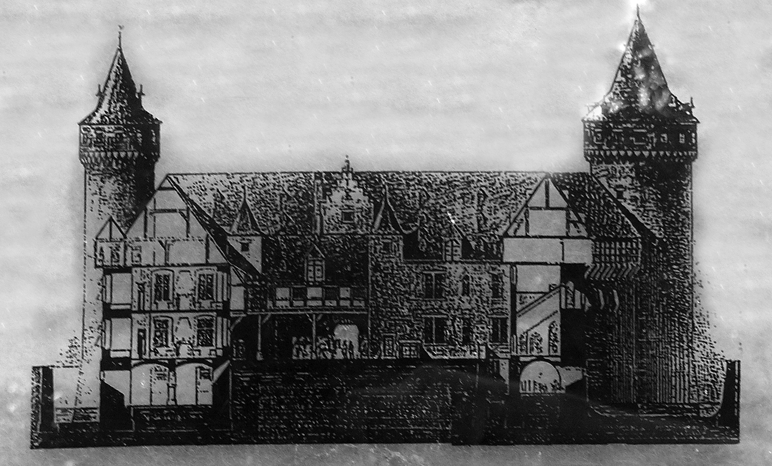 Rekonstruktionszeichnung der Burg Kempen